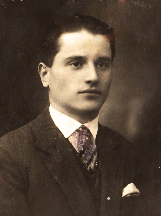 Il poeta futurista Alberto Vianello